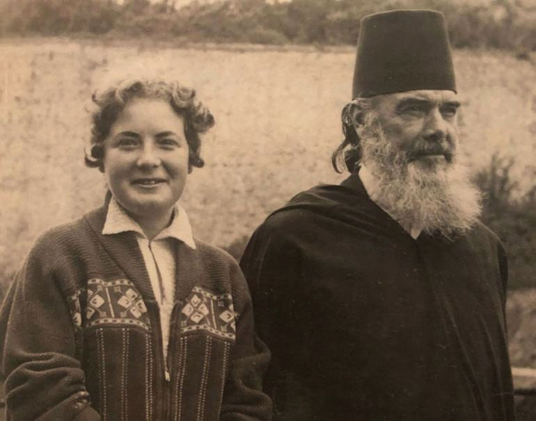 Messali Hadj et Genena Messali